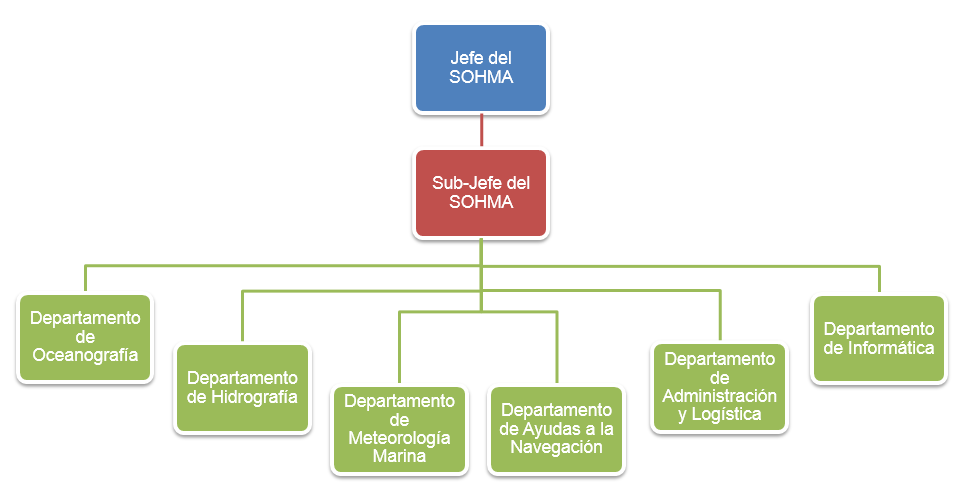 Organigrama